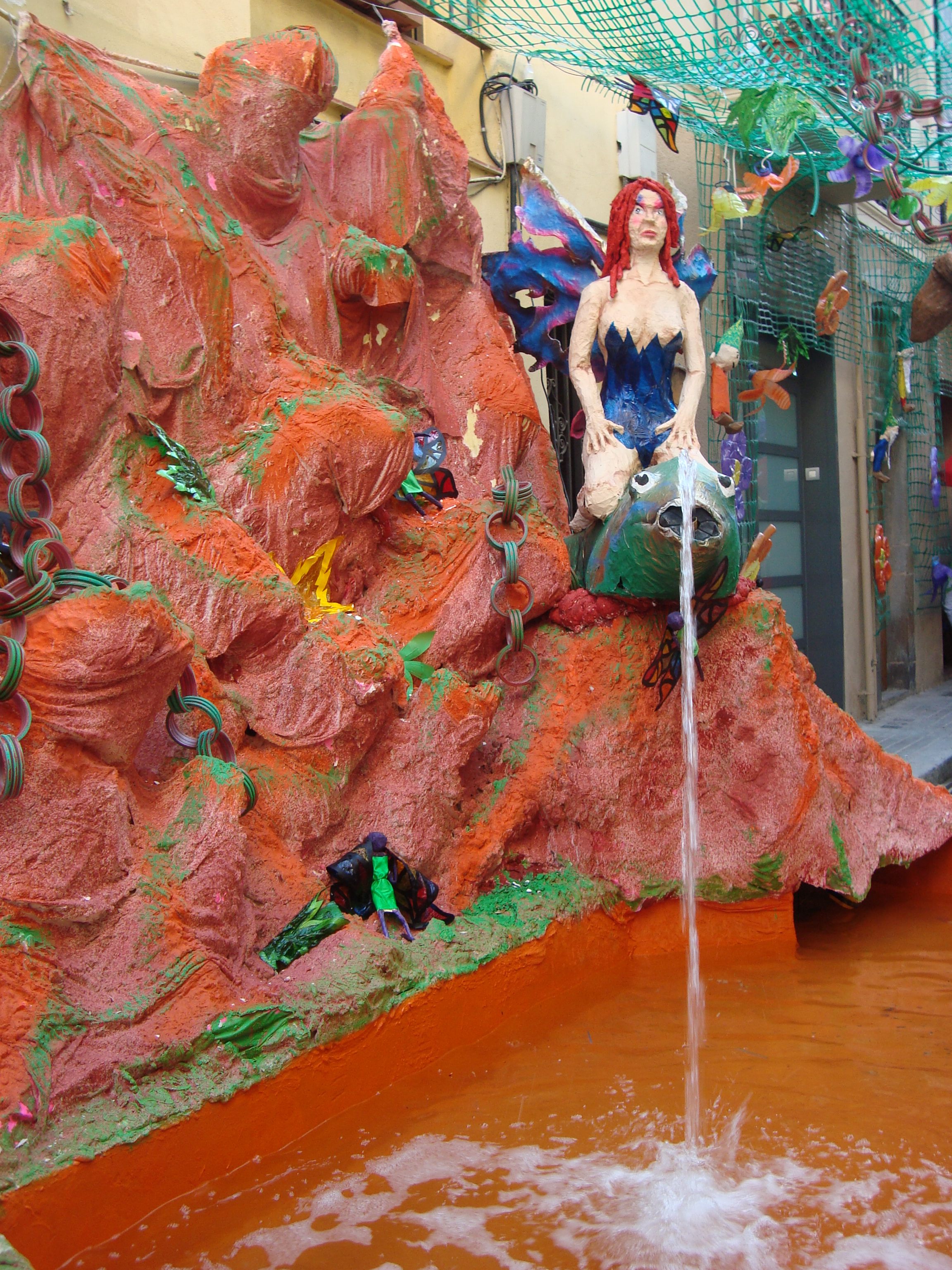 Fotografia del carrer Progrès a les Festes de Gràcia.